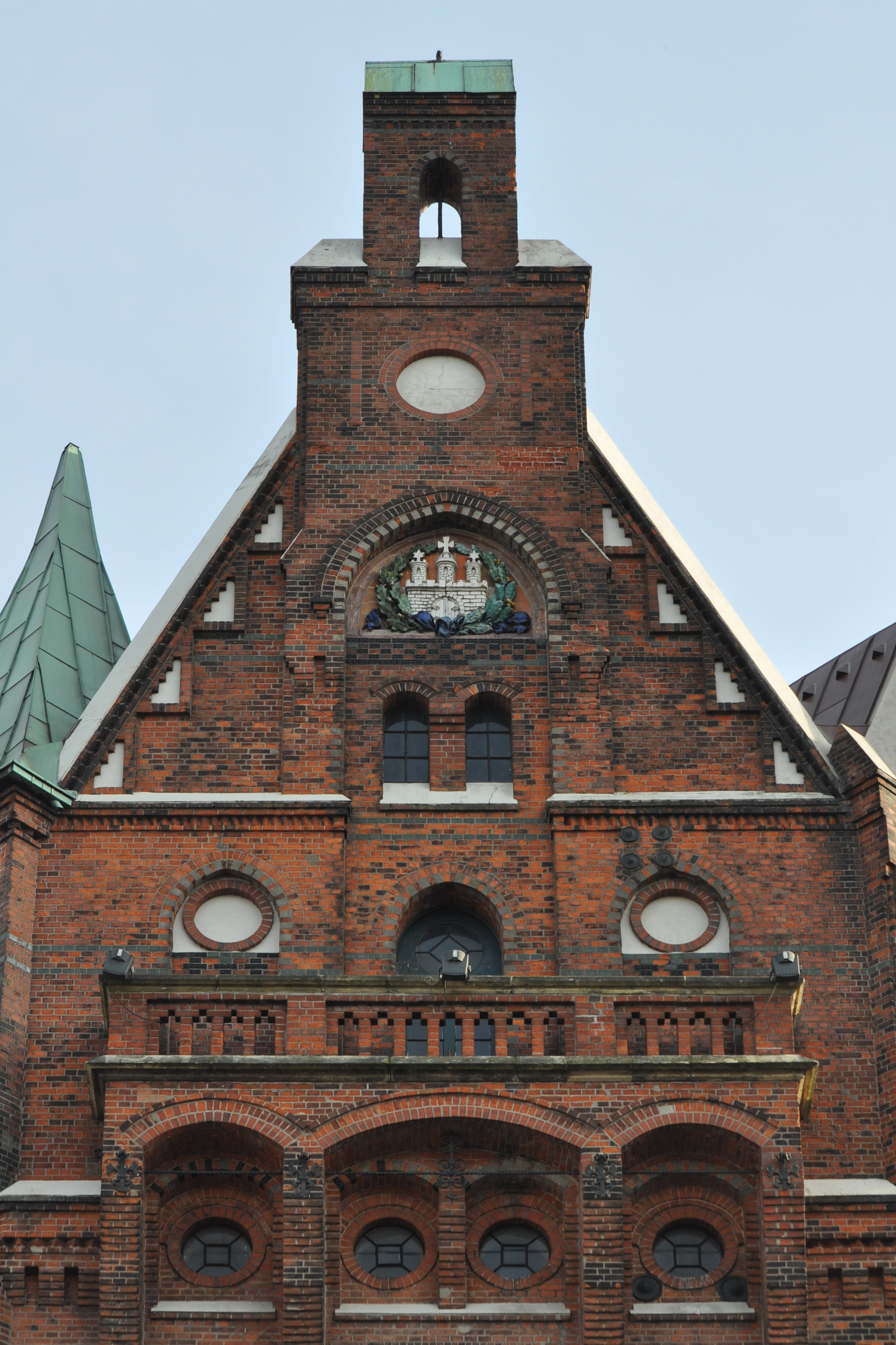 Detail des Kopfbaus des Blocks E in der Speicherstadt in Hamburg-HafenCity. This is a photograph of an architectural monument.